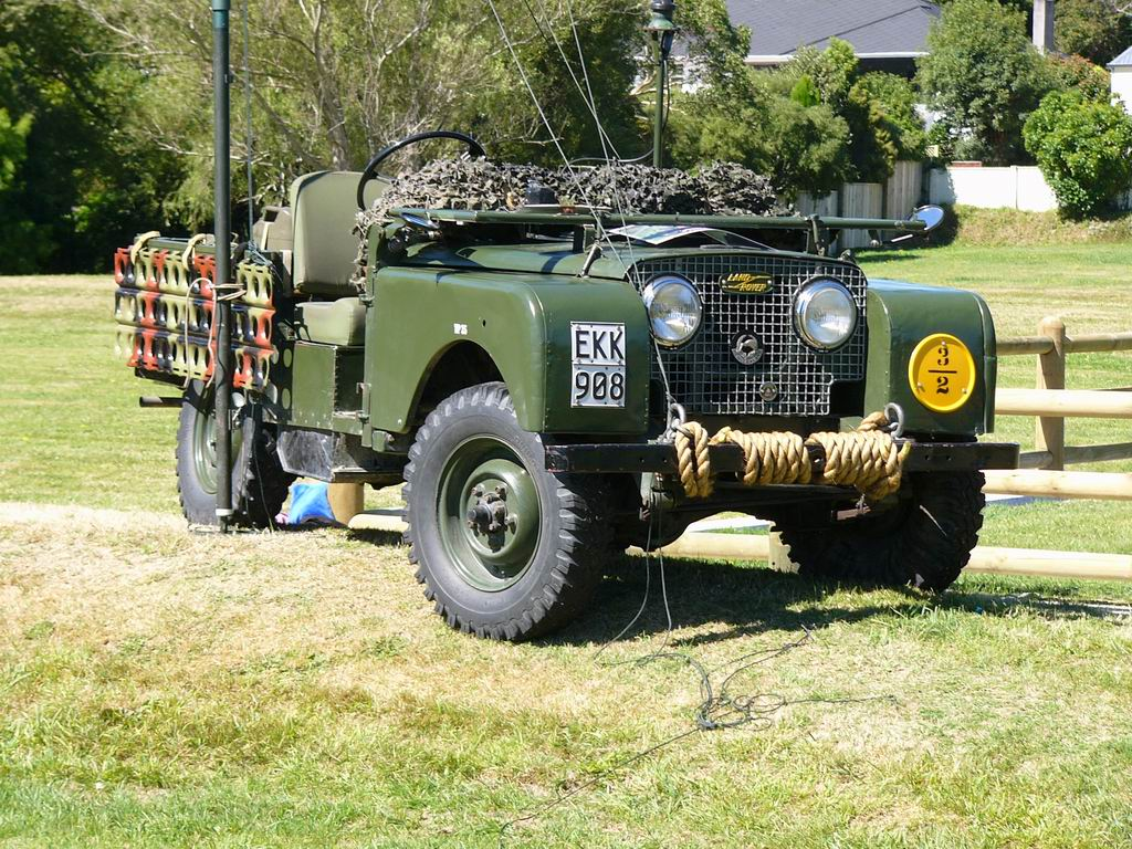 1951 Landrover Series 1